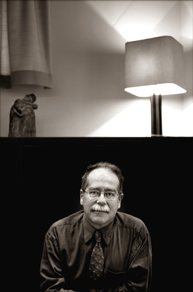 Rik Coolsaet